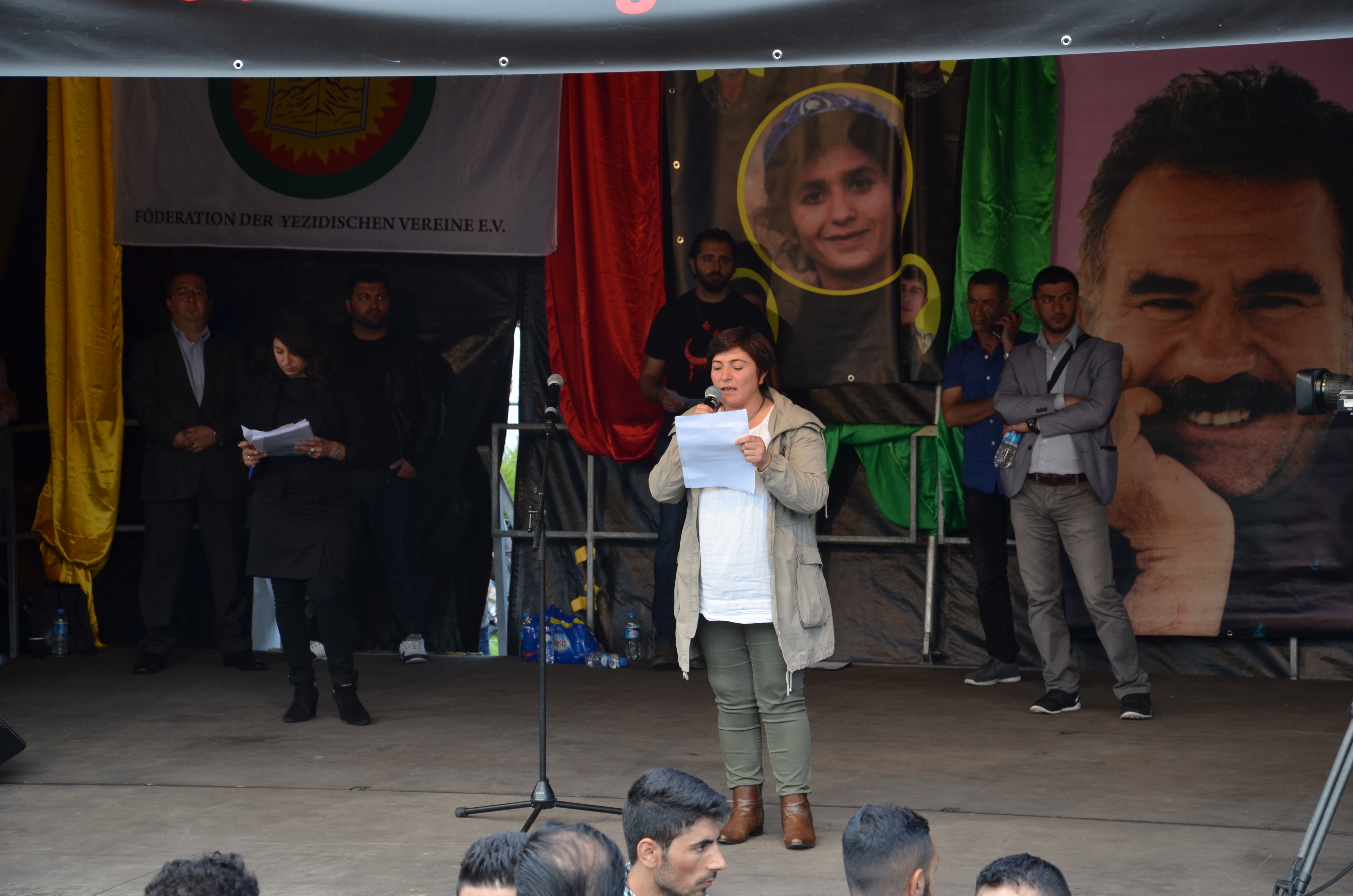 Für Hilfe gegen den Terror der Gruppe Islamischer Staat (IS) demonstrierten am Samstag, den 17. August 2014 rund 11.000 Jesiden, Kurden, Aleviten und andere in Hannover. Die Kundgebung auf dem Waterlooplatz und der Demonstrationszug durch die Innenstadt der niedersächsischen Landeshauptstadt verlief nach Angaben der Deutschen Presse-Agentur und zahlreicher anderer Medien wie der Hannoverschen Allgemeinen Zeitung "äußerst friedlich". Teilnehmer waren unter anderem die Alevitische Gemeinde Deutschland e.V. sowie ... Organisatoren (Veranstalter) waren unter anderem die FÖDERATION DER YEZIDISCHEN VEREINE E.V., der aus Celle angereiste Yilmaz Kaba sowie ...